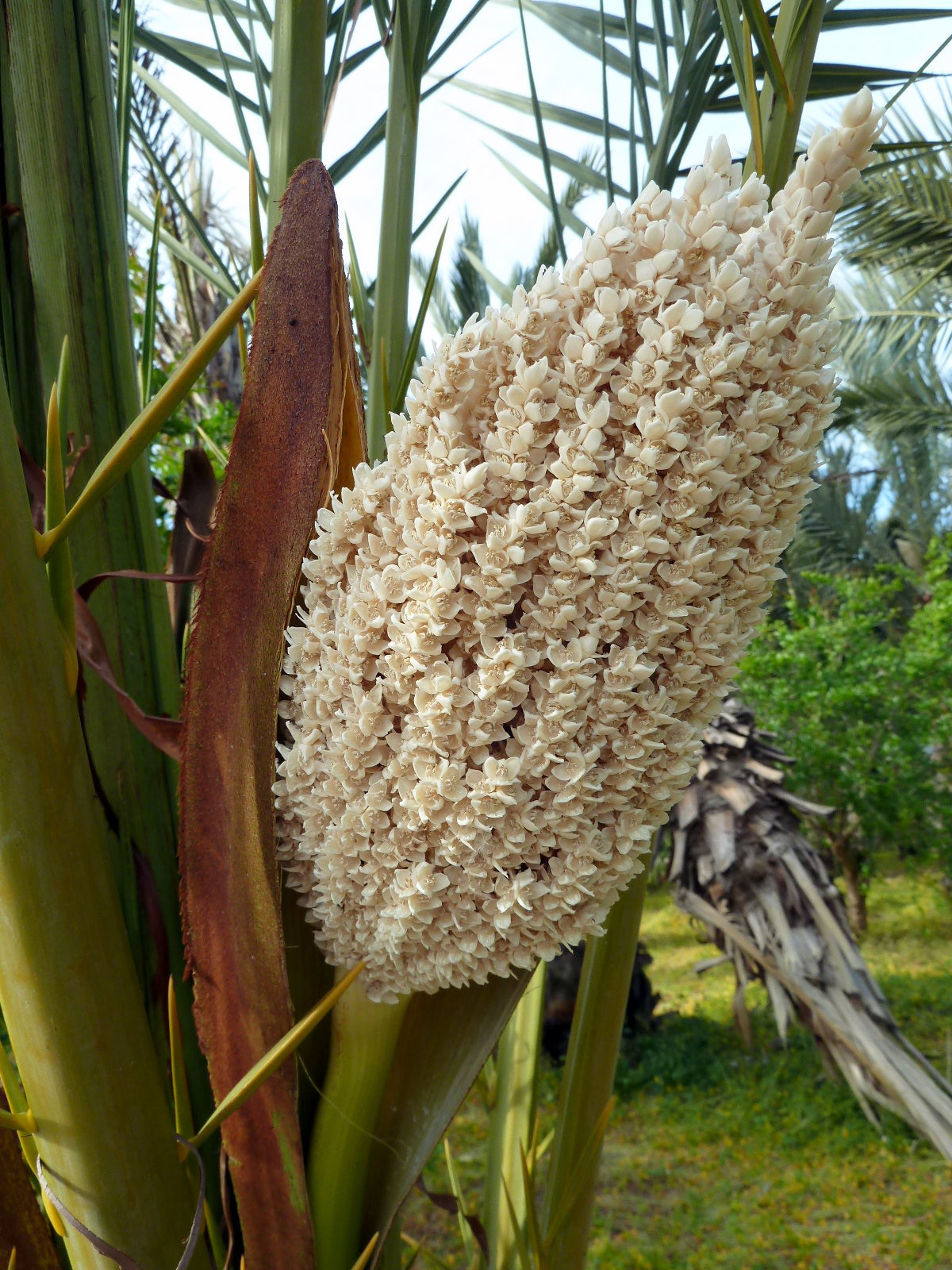 Phoenix dactylifera (Palmera datilera) : Inflorescencia macho emergiendo de su espata - La Huerta, Albatera (Alicante, España).